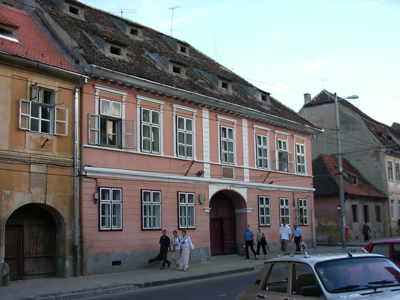 Honterus house, Braşov (Kronstadt)